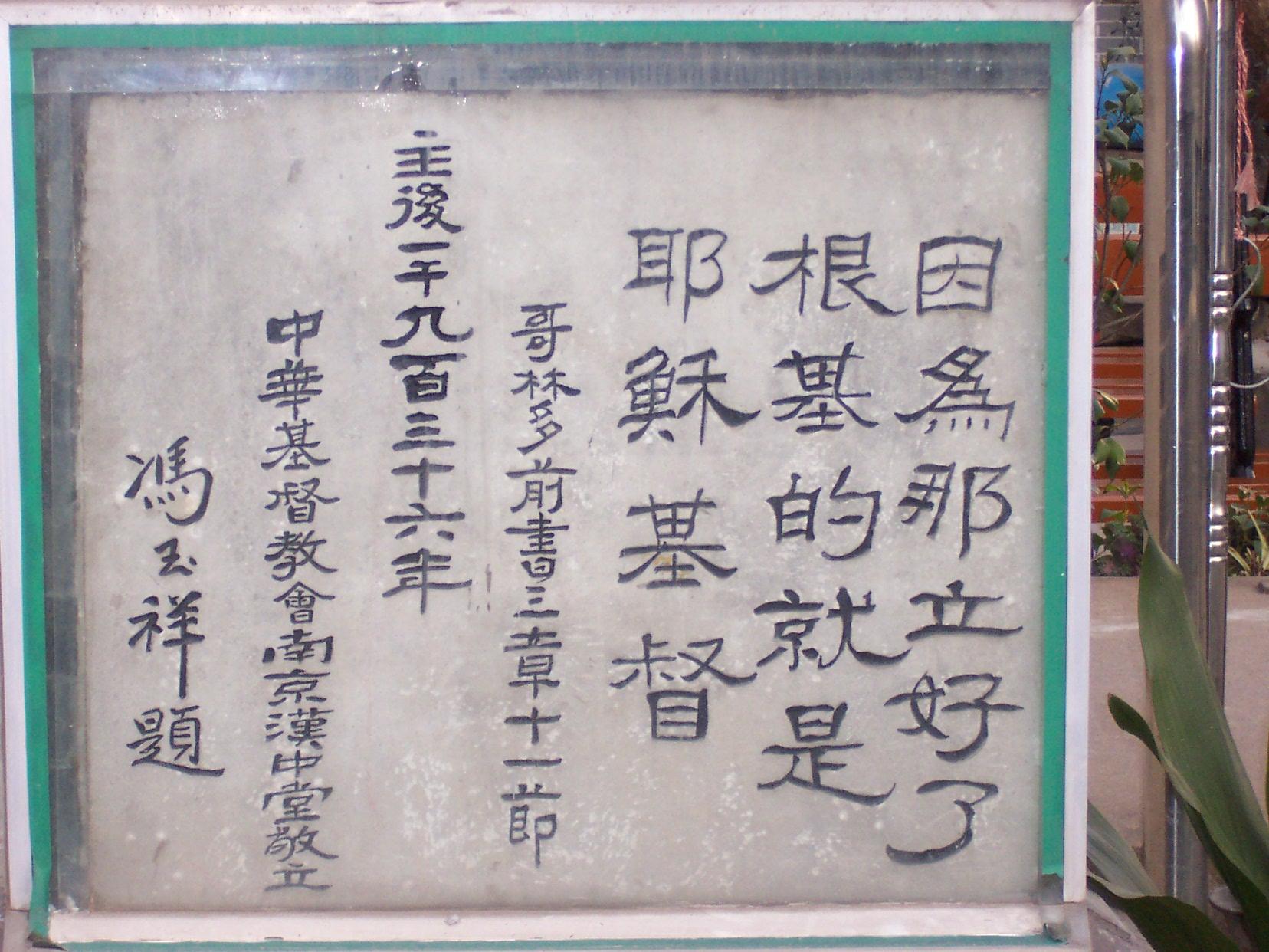 南京基督教莫愁路堂 许可协议 拍摄